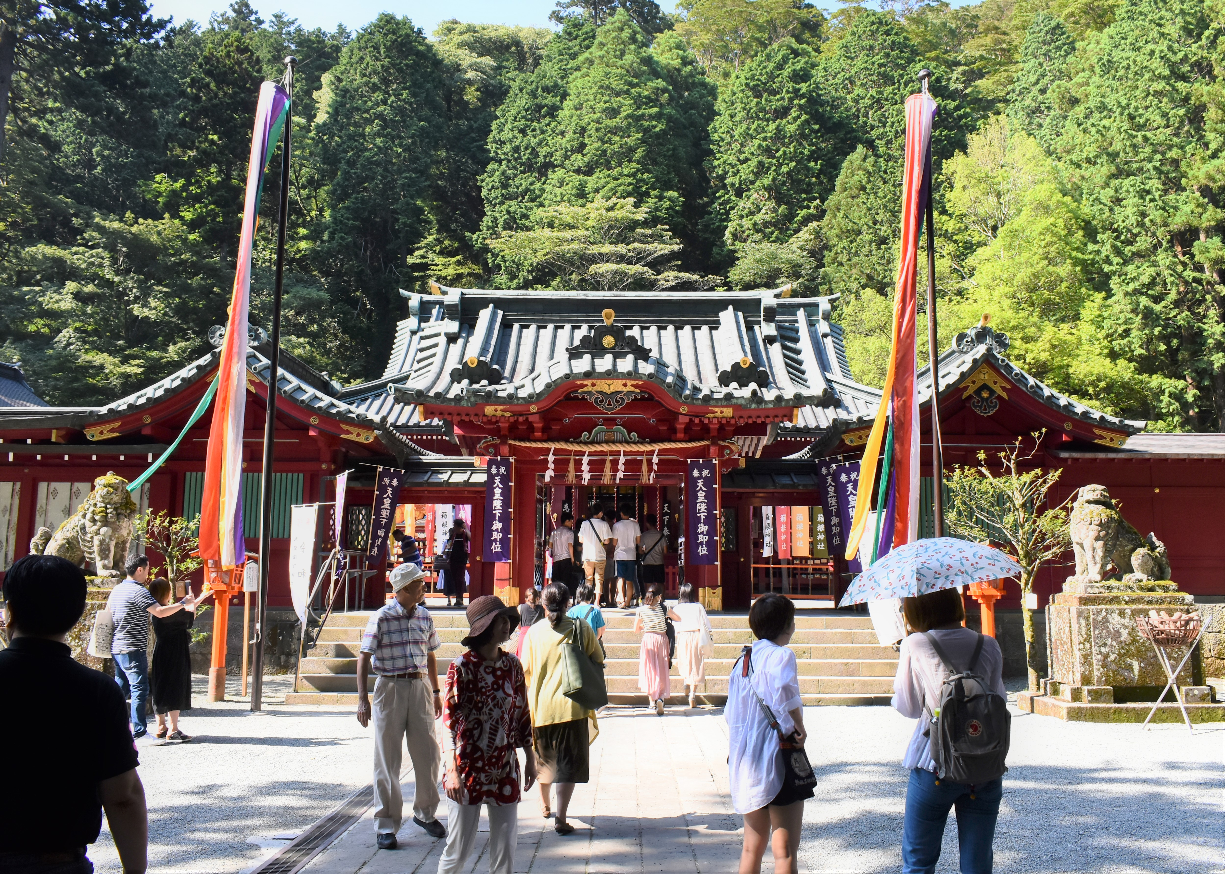 箱根神社の拝殿